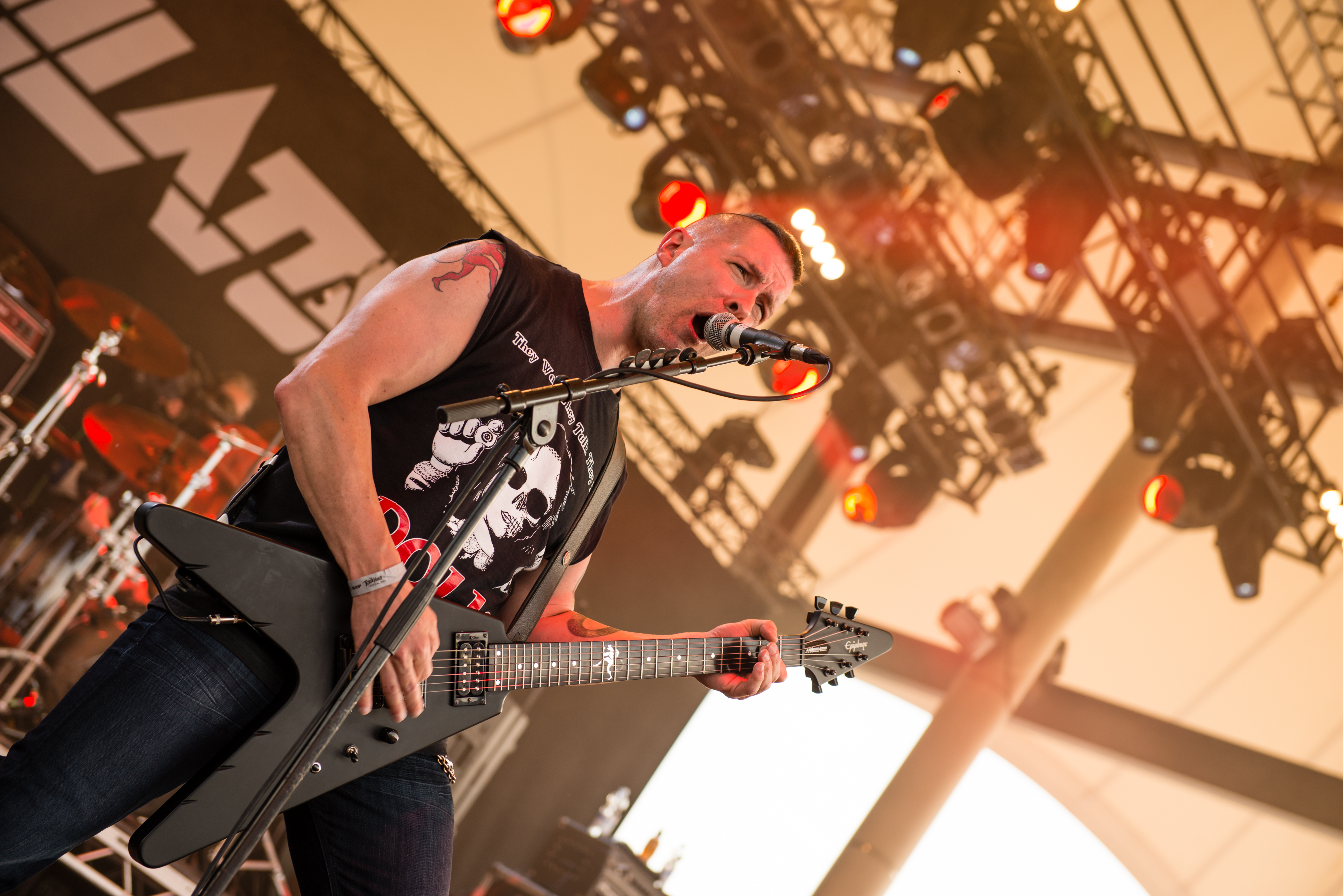 'Rock Hard Festival 2014 - Gelsenkirchen': 'Annihilator'